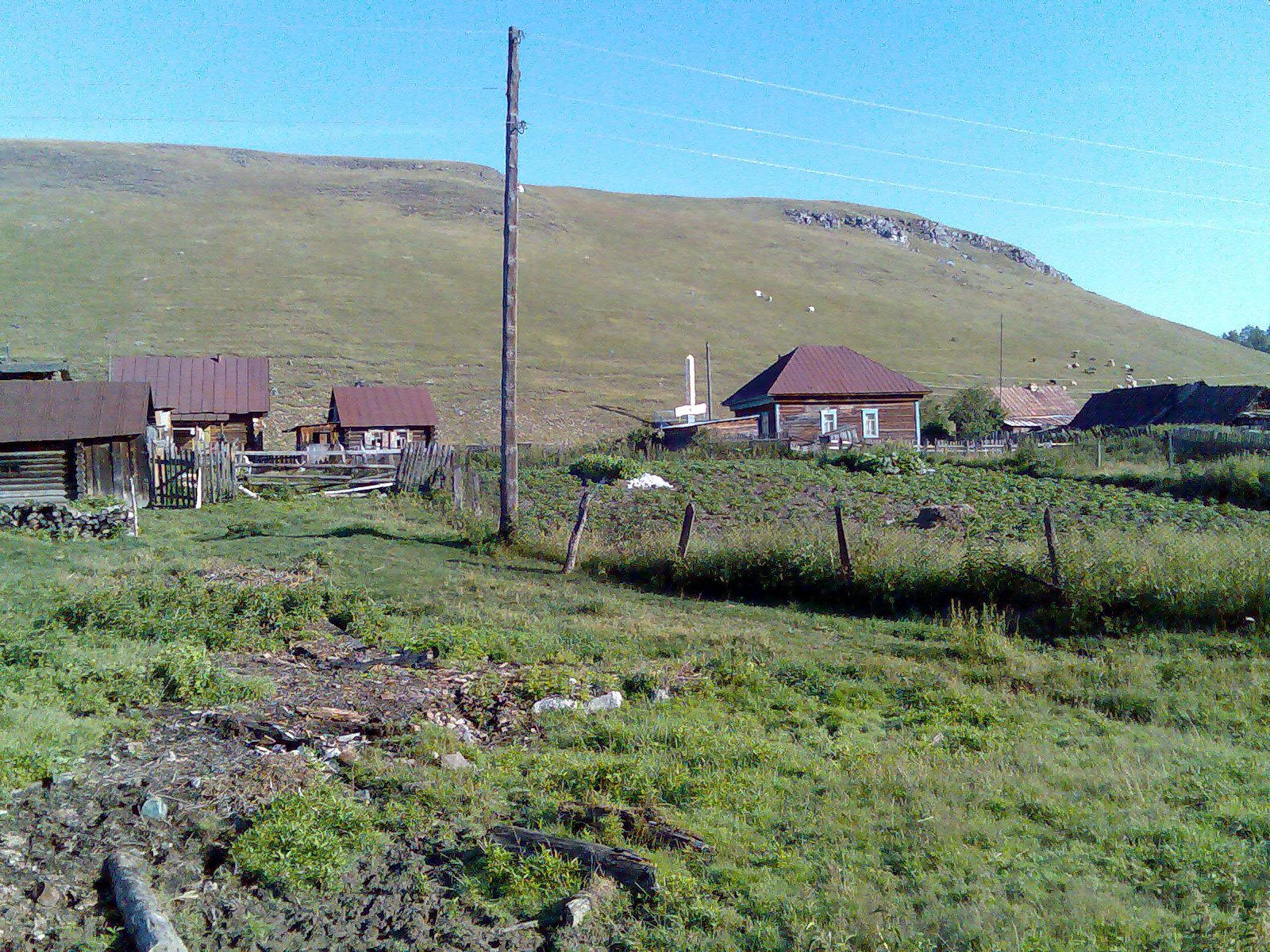 Арышпарово